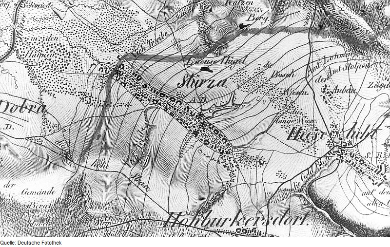 Original image description from the Deutsche Fotothek Dürrröhrsdorf-Dittersbach-Stürza. Oberreit, Sect. Stolpen, 1821/22